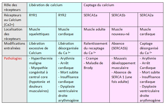 La mutation des récepteurs RyR et SERCA du RS entraîne des modifications lors de la libération et la récupération du calcium par le RS. Ceci entraîne des pathologies.